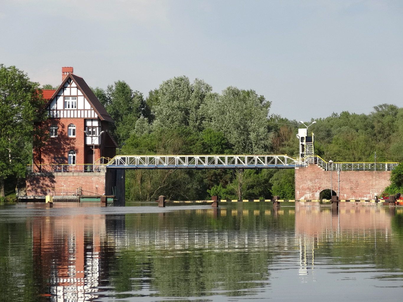 Jaz walcowy Czersko Polskie w Bydgoszczy (ok. 1905 r.)